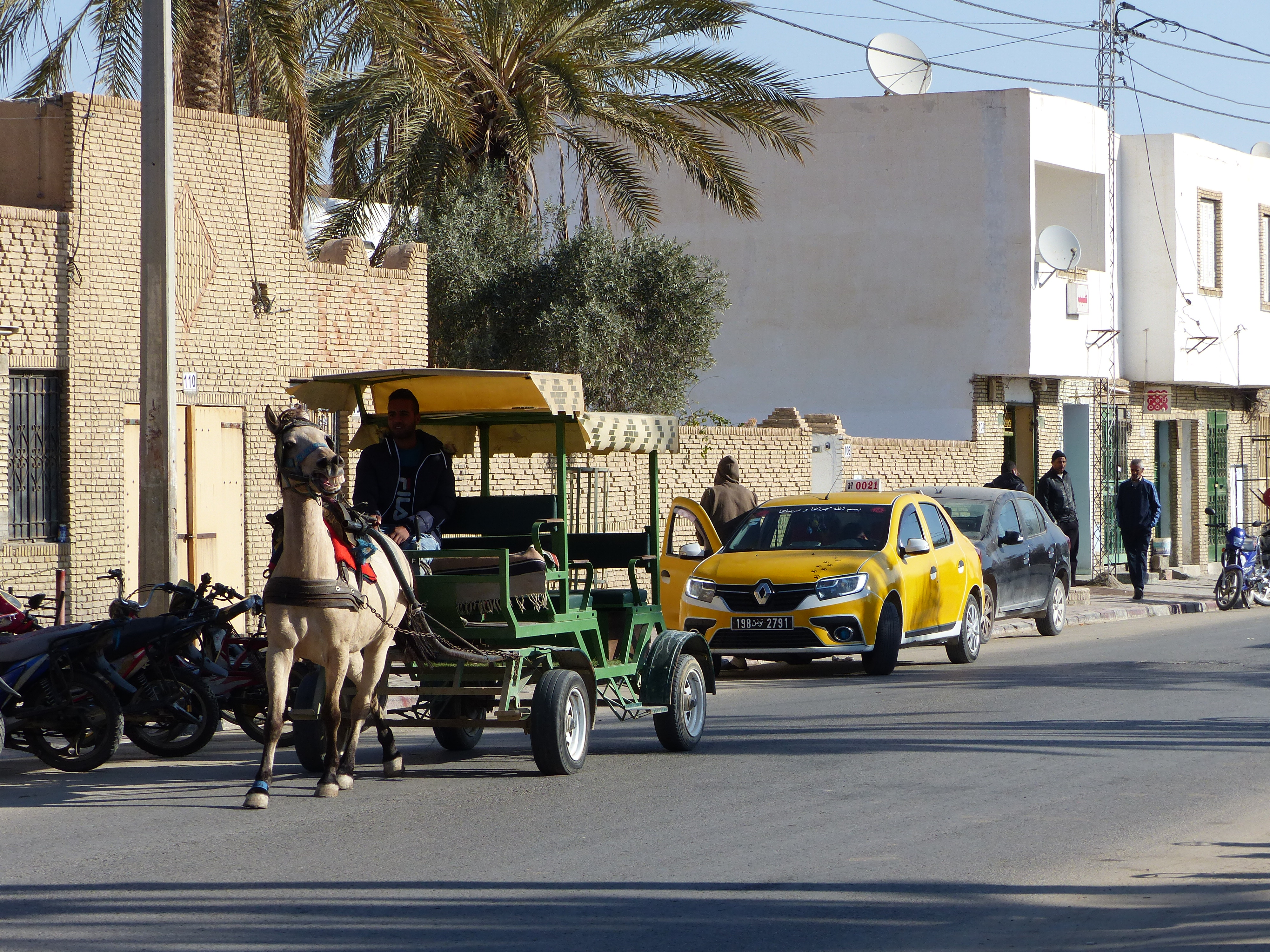 Calèche au galop dans les rues de Tozeur, Tunisie This is an image with the theme "Africa on the Move or Transport" from: Tunisia